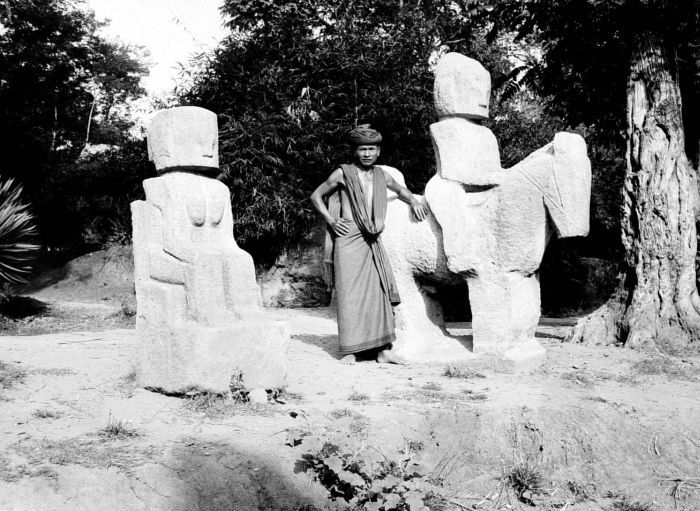 Negatief. Ook onder de Batak waren stenen beelden bekend. De beelden van de foto waren niet oud toen de opname gemaakt werd. Ze stellen de stamhouders van de marga (stam) voor. Het bijschrift van de foto geeft de volgende details: "Uit alle plaatsten waar de marga verstrooid woont, wordt bijgedragen voor de oprichting; men legt er door vast de plaats van de oer-hoeta (dorp) en verhoogt er door het aanzien van de marga." Het motief van het rechterbeeld, paard met voorouder-ruiter, is overigens wel oud en er zijn diverse (slecht te dateren) voorbeelden van bewaard gebleven. De beelden stelden een overleden raja (hoofd) voor en waren nog bij diens leven vervaardigd. (P. Boomgaard, 2001). In Hutanagodang (Toba, Sumatra) worden beelden gemaakt van de stamhouders van een stam (marga) om de plaats van het dorp (de oer-huta) vast te leggen en het aanzien van de stam te verhogen. Stenen beelden te Hoeta na Godang, Toba-Batak gebied, Noord-Sumatra, ca. 1920